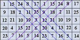 Համաանկյունագծային քառակուսու կոտրված անկյունագծեր